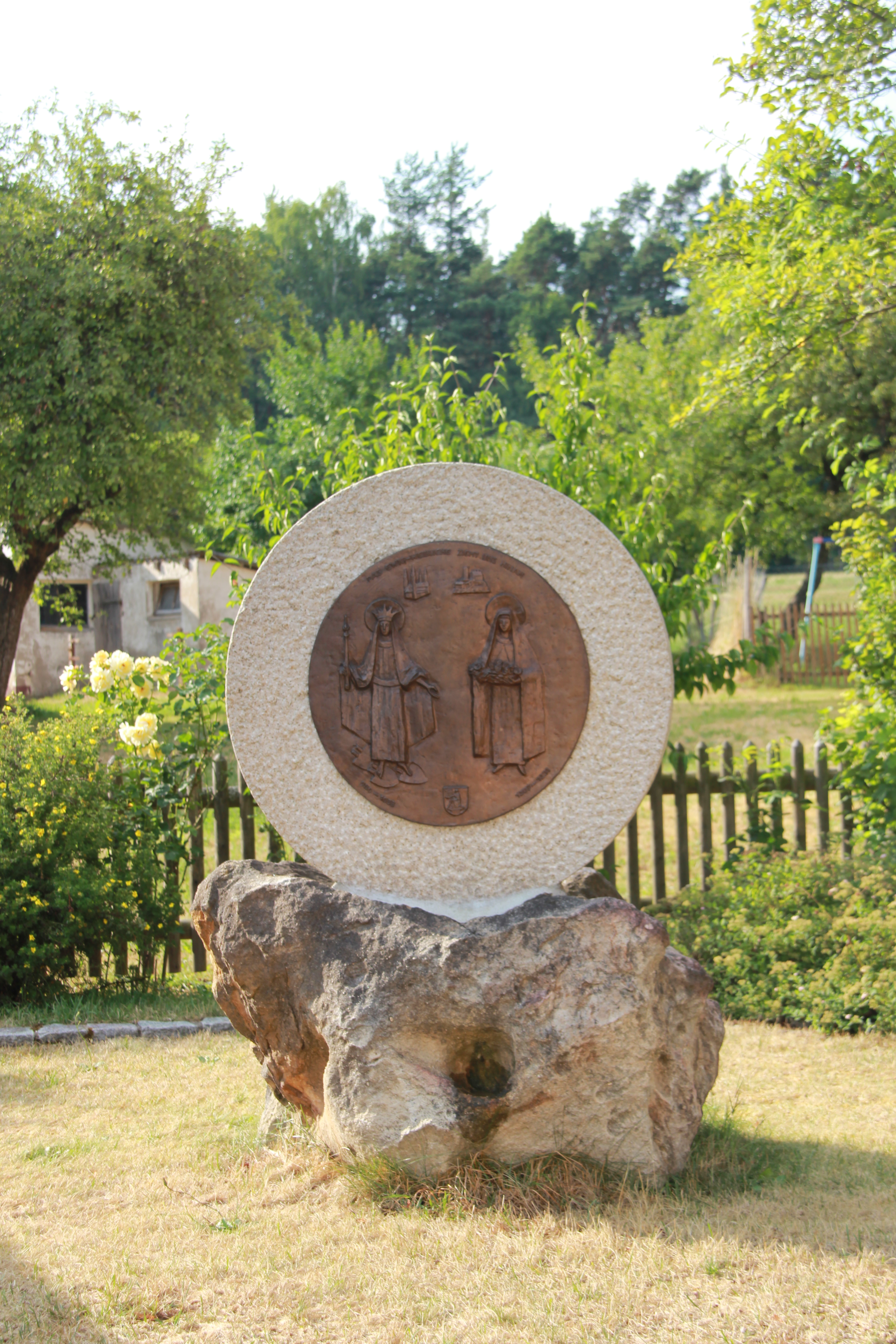 Bronzerelief mit religiösen Figuren (mit hl.Kunigunda und hl.Elisabeth) in Weidenloh